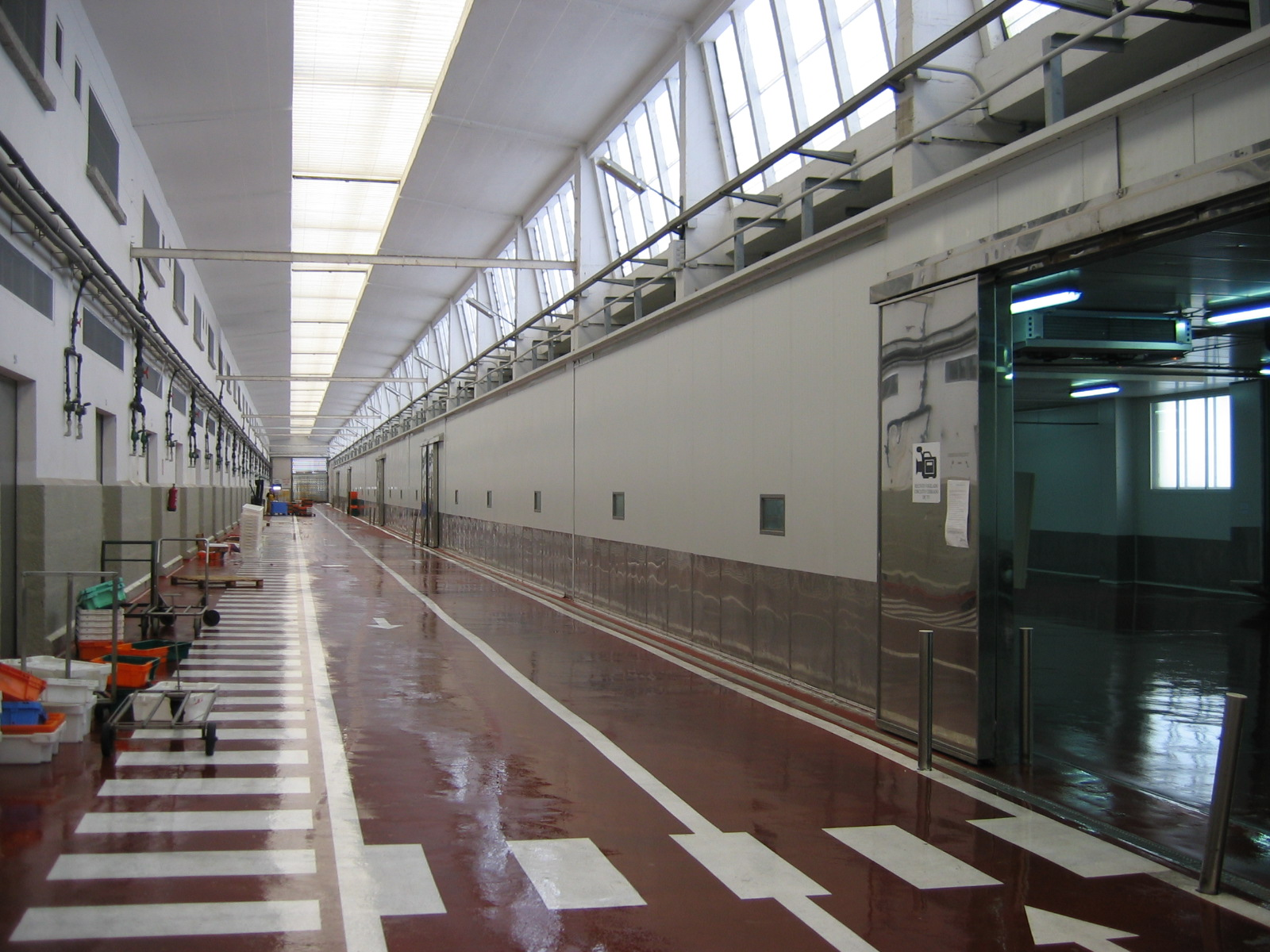 Interior dunha lonxa en Galicia